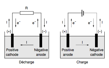 Schéma de fonctionnement d'un accumulateur en charge et décharge montrant le sens du courant et des électrons ainsi que le changement de fonctionnement de la positive et de la négative.